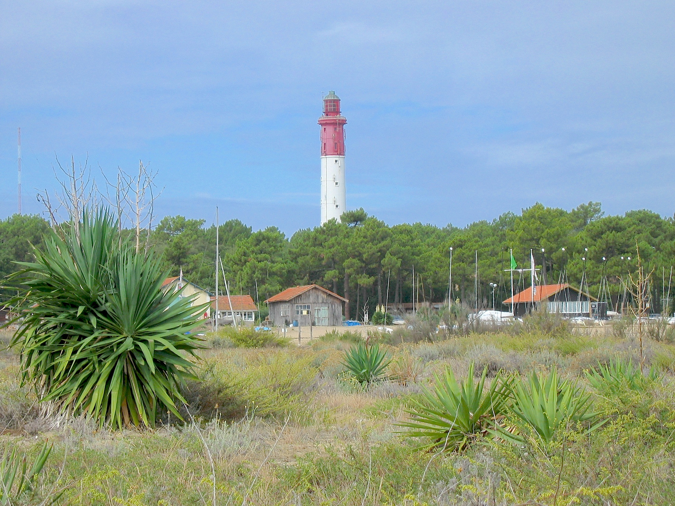 Phare du Cap Ferret. Photo personnelle